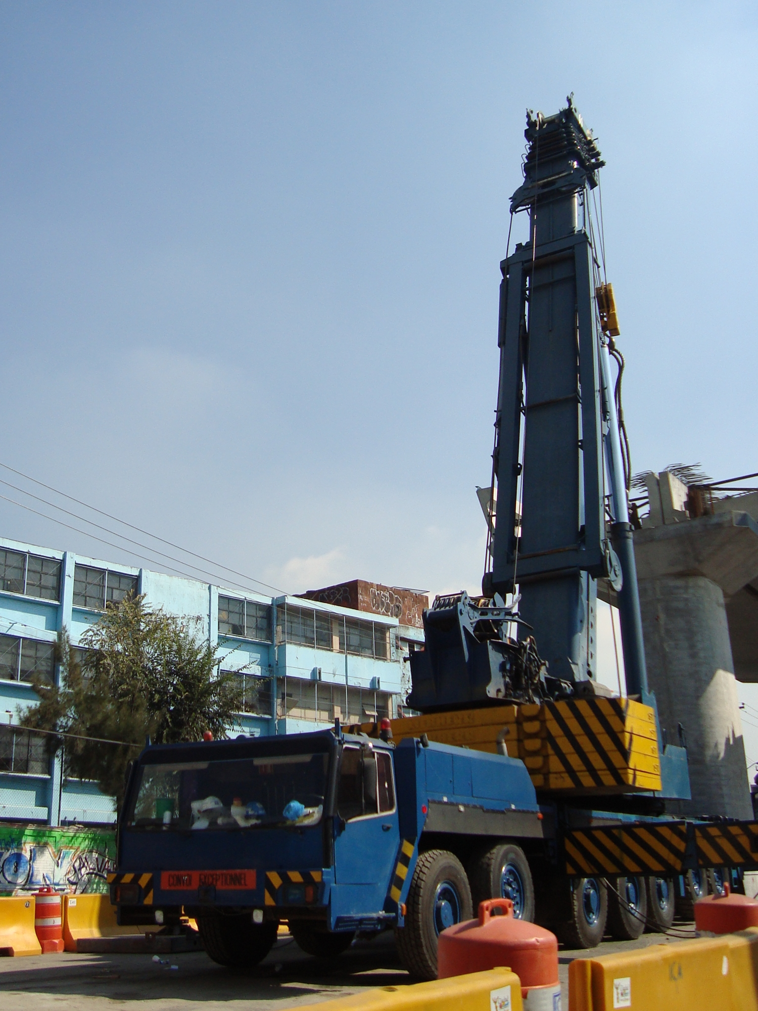 Obras de construcción de la línea 12 del metro sobre la avenida Tláhuac, a la altura de Santiago Zapotitlán (México). Al fondo se observa la escuela secundaria Tlahuizcalli, que fue demolida en 2011.